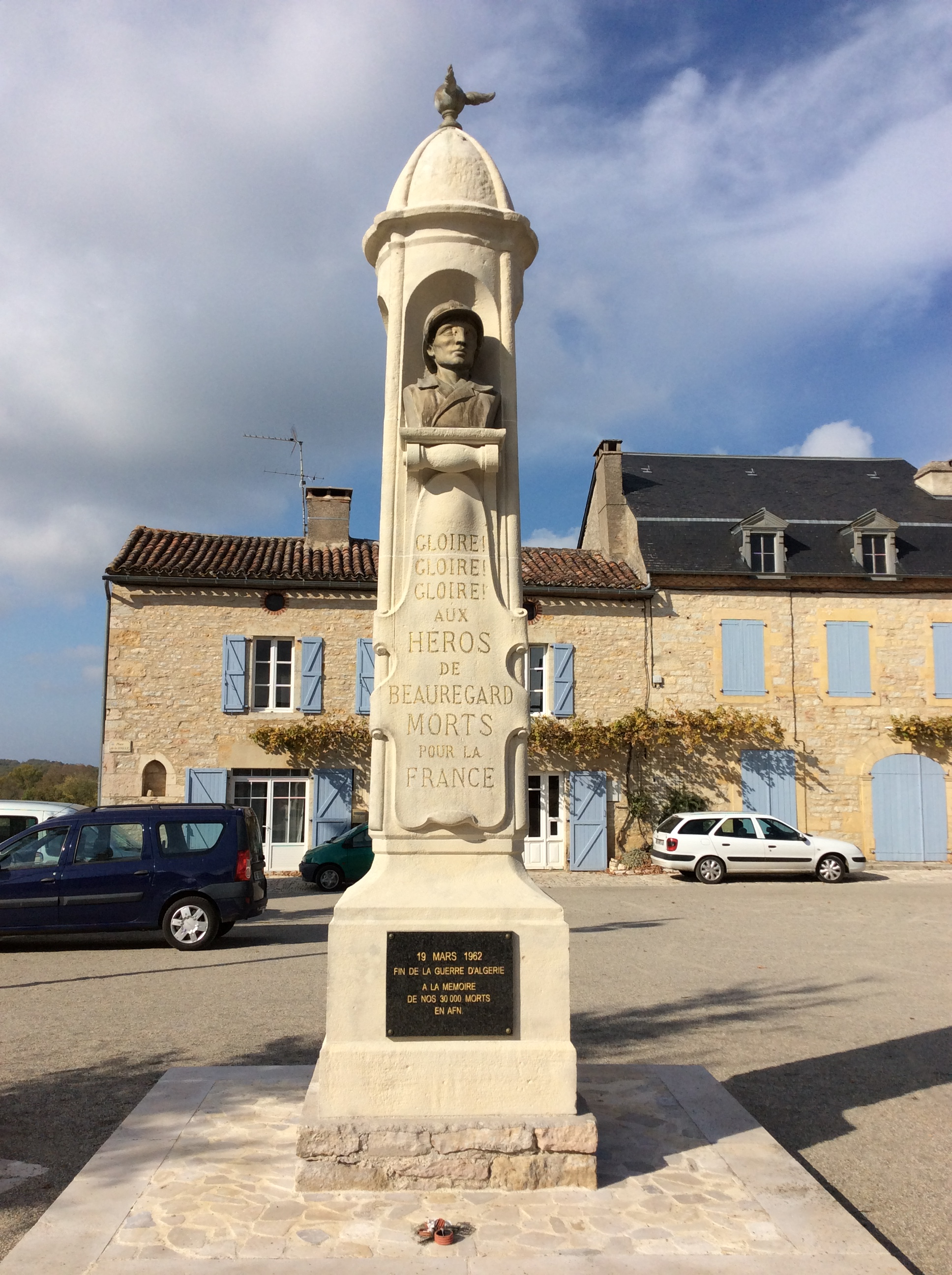 Monument aux morts de Beauregard (46), face 1